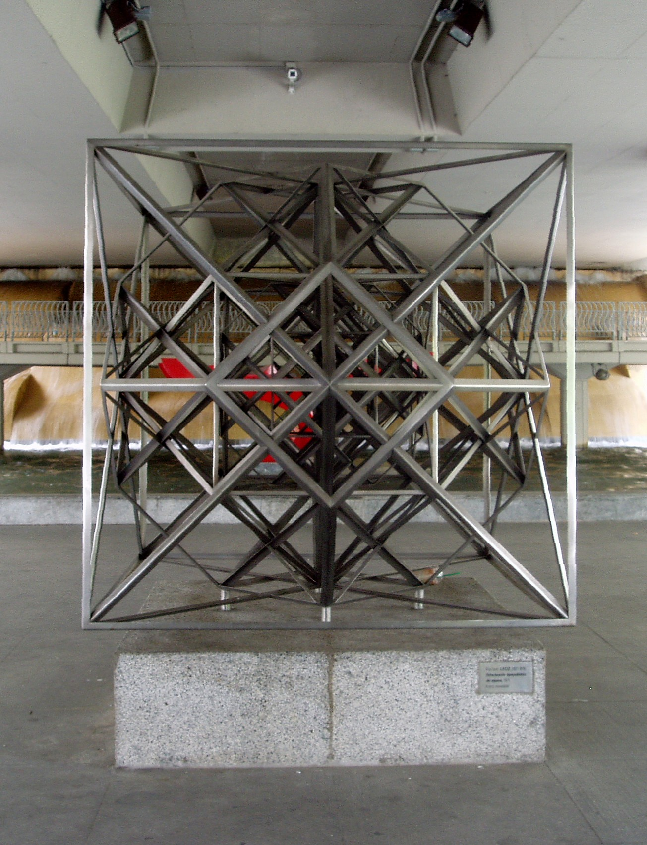 Estructuración hiperpoliédrica del espacio. Rafael Leoz. Museo Arte Público. Madrid. España